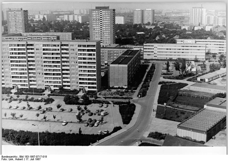 ADN-ZB Link 17.7.87-cc-Berlin: Marzahn-In den vergangenen zehn Jahren entstanden über 50.000 Wohnungen, zahlreiche Schulen, Turnhallen, Klubgaststätten, Kaufhallen und weitere Einrichtungen in Marzahn. Rund 160.000 Bürger wohnen gegenwärtig in diesem jungen Stadtbezirk. 1987 werden in Marzahn über 5.500 Wohnungen gebaut, die meisten davon im Gebiet Ahrensfelde-Süd.Berlin, Marzahn, Wohnblocks Information added by Wikimedia users.Der Flachbau in der rechten unteren Ecke ist das neue Gebäude der freiwilligen Feuerwehr Berlin-Marzahn abgebildet. Das alte Gebäude wurde als örtliche Parteizentrale durch die PDS genutzt.